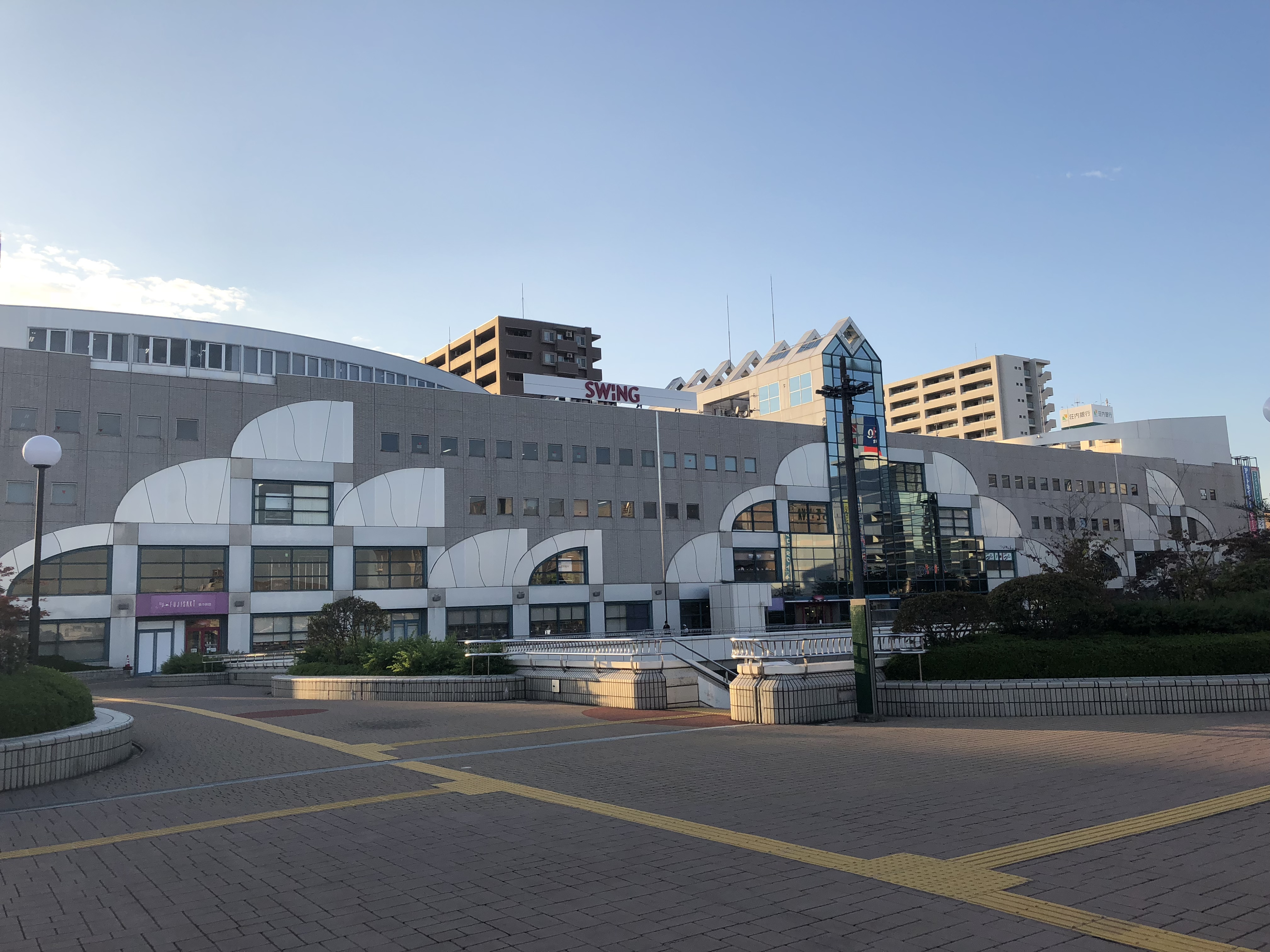 ペデストリアンデッキ側